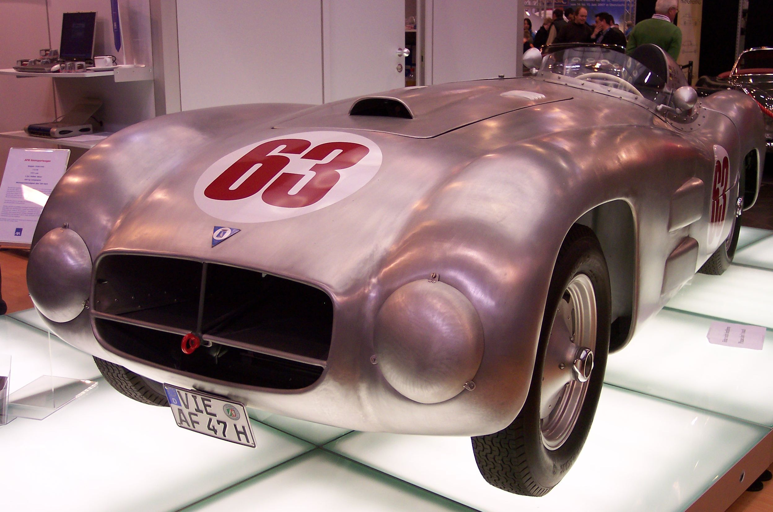 Alex von Falkenhausen Motorenbau racecar, based on a BMW 328